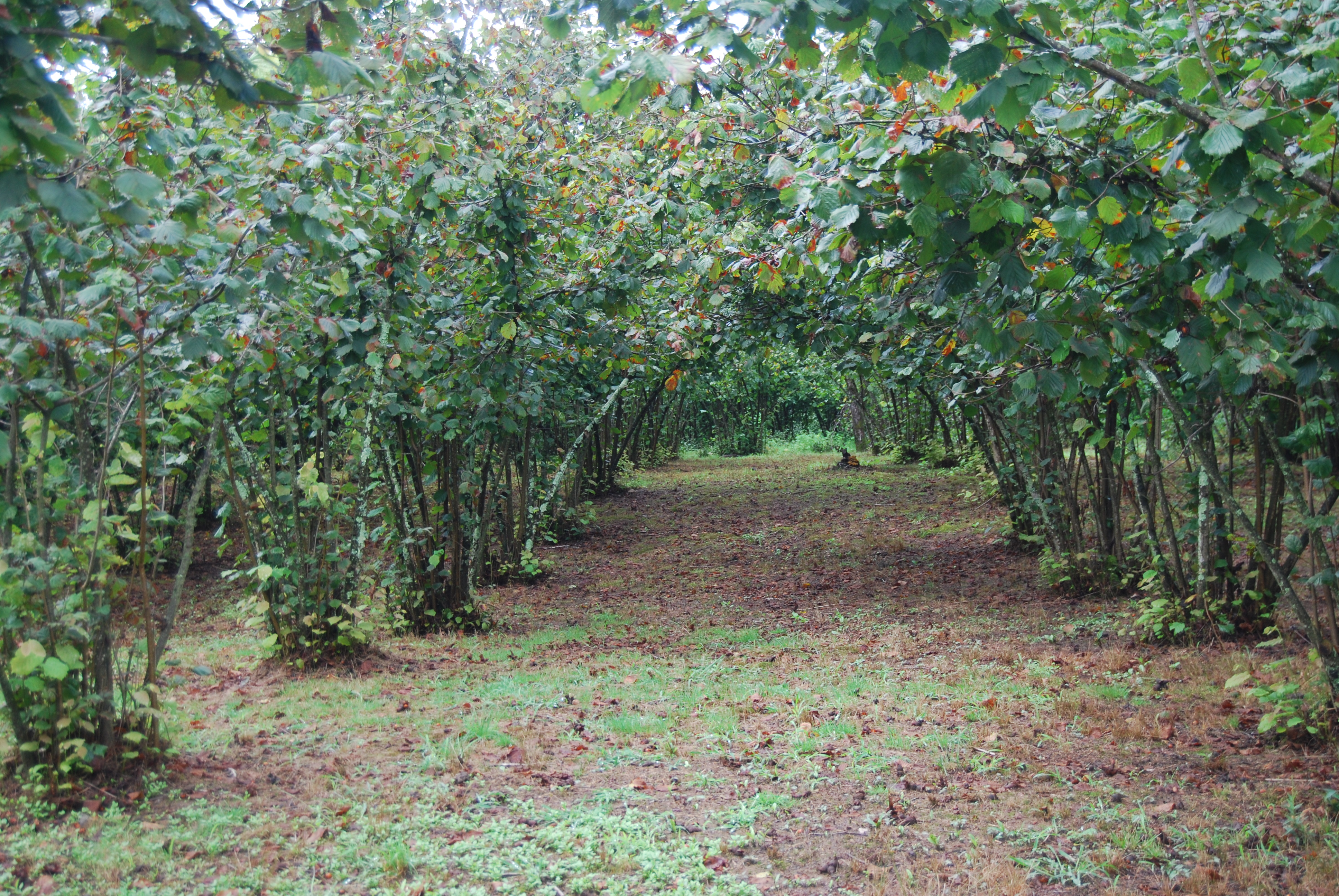 თხილნარი გურიაში